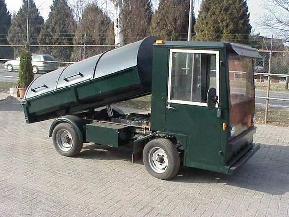 Apollo